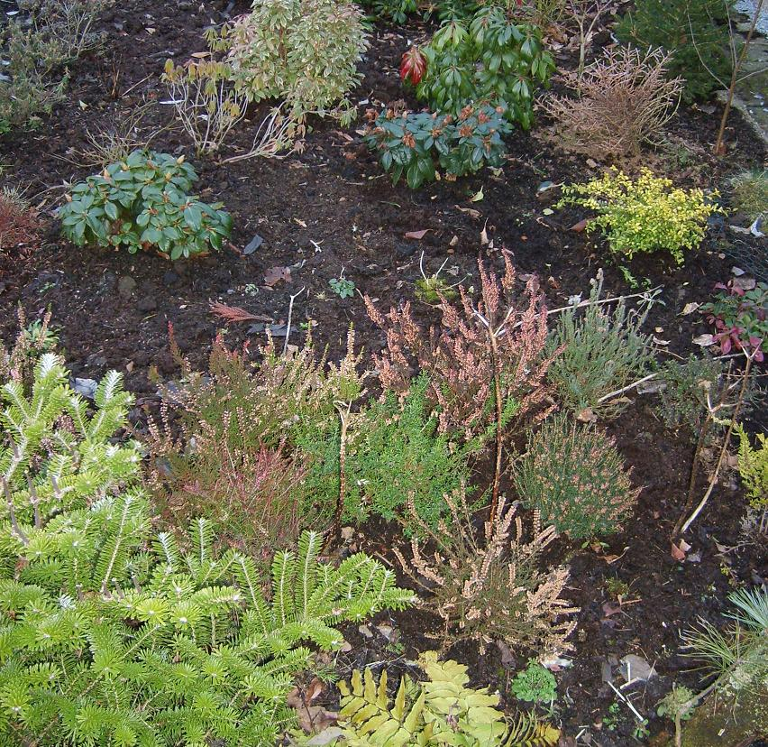 Surbundsbed billede